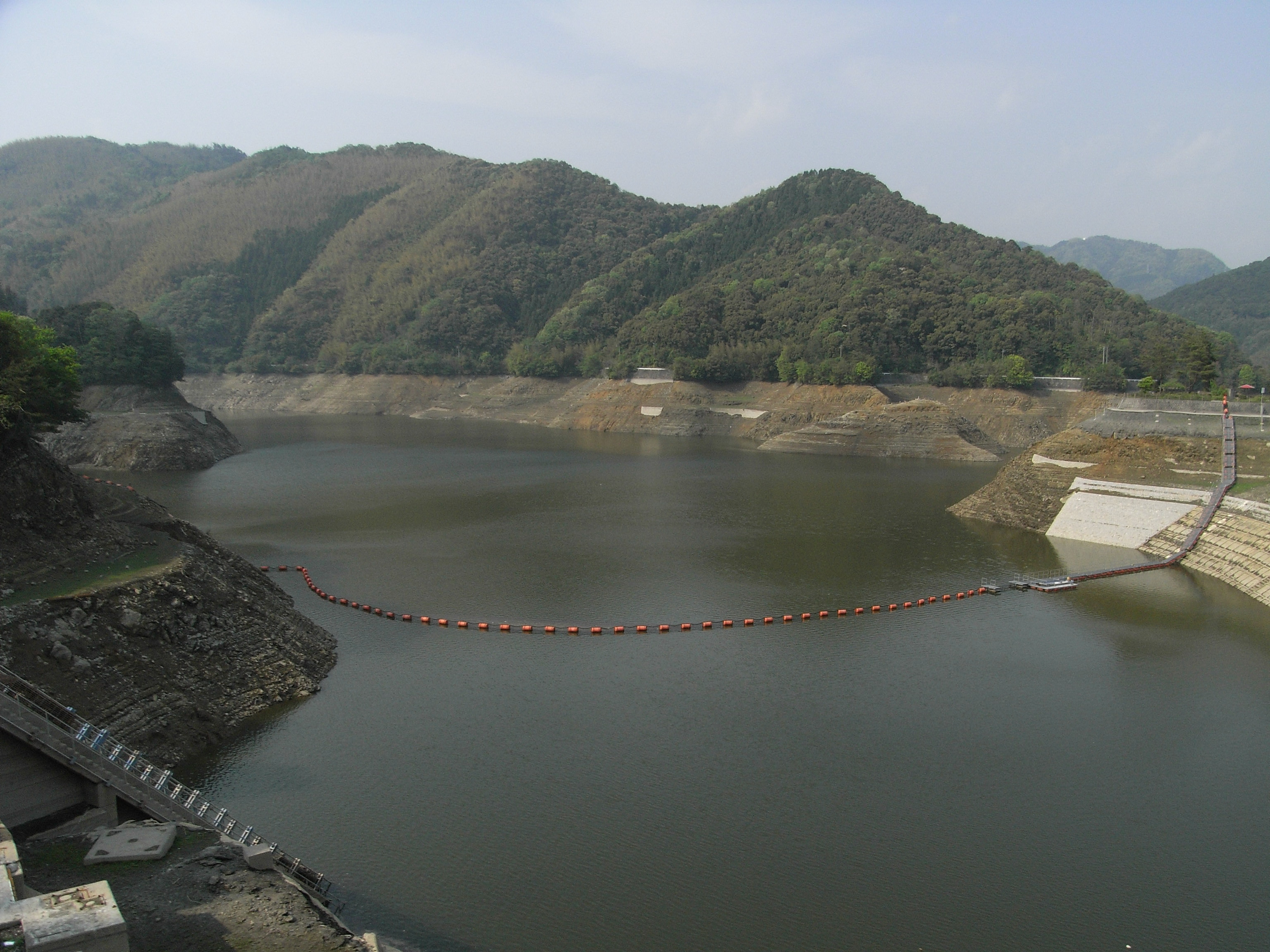 Lake